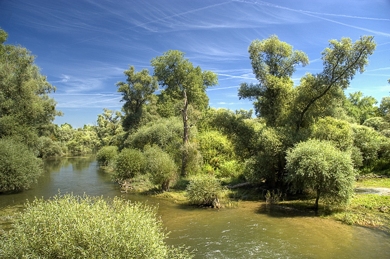 Das Sauer-Delta bei Munchhausen, Alsace, France